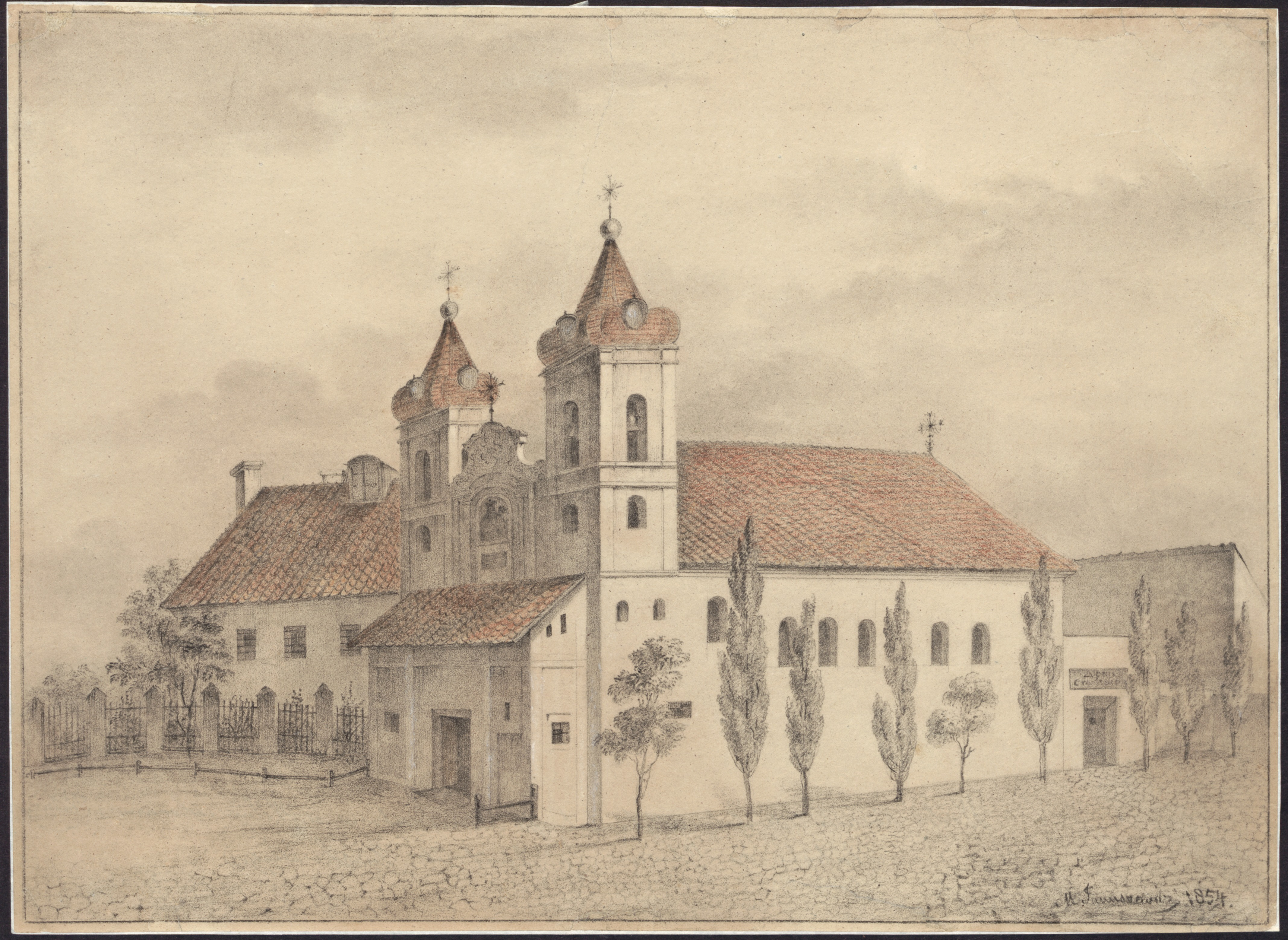 Беларуская (тарашкевіца): Вільня (Vilnia), вуліца Людвісарская (vulica Ludvisarskaja). Касьцёл і кляштар баніфратаў